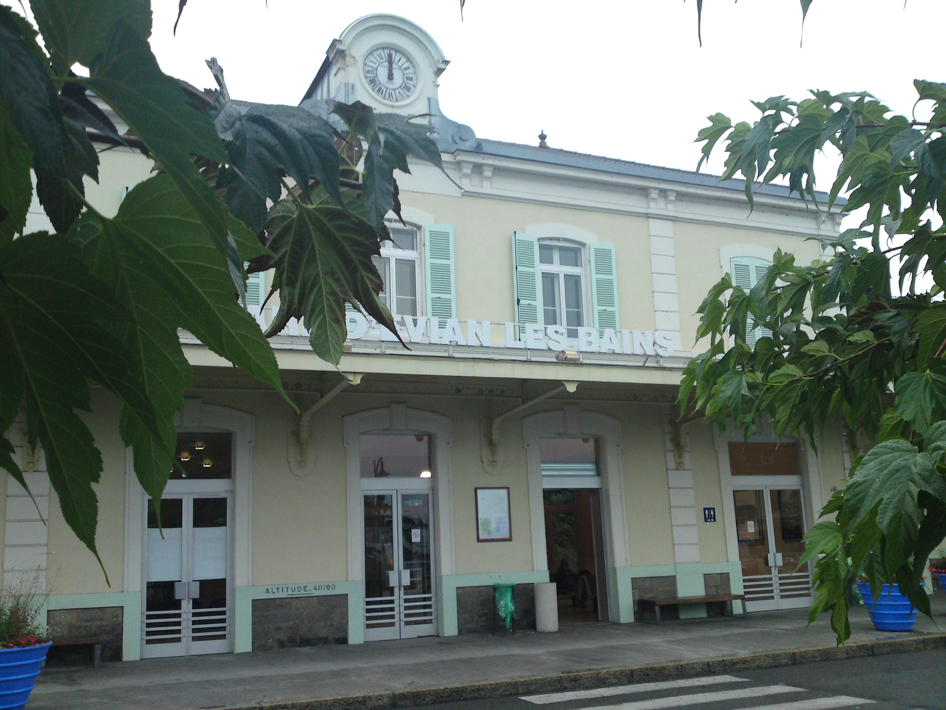 gare d'évian les bains